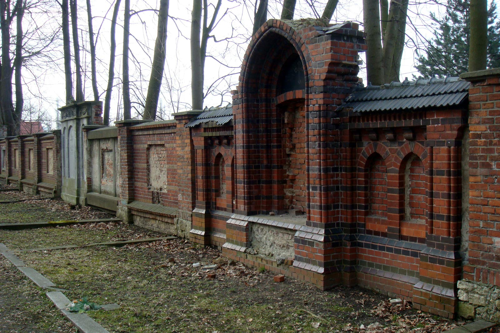 Fragment muru zachodniego, ze zniszczonymi nagrobkami, na cmentarzu ewangelicko-augsburskim przy ul. Wrocławskiej w Opolu.